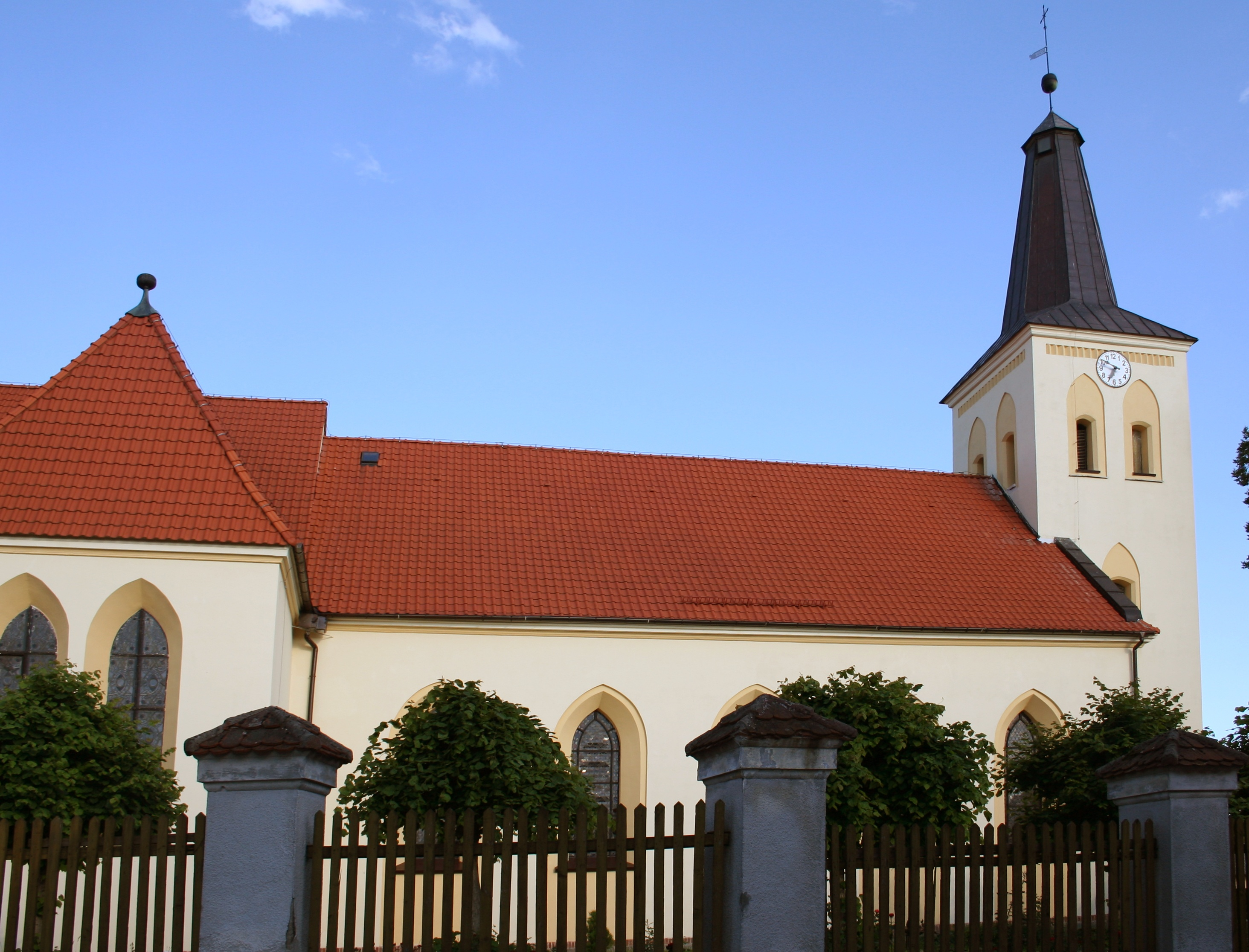 Kościół św. Katarzyny Aleksandryjskiej w miescowości Śliwice, woj. kujawsko-pomorskie